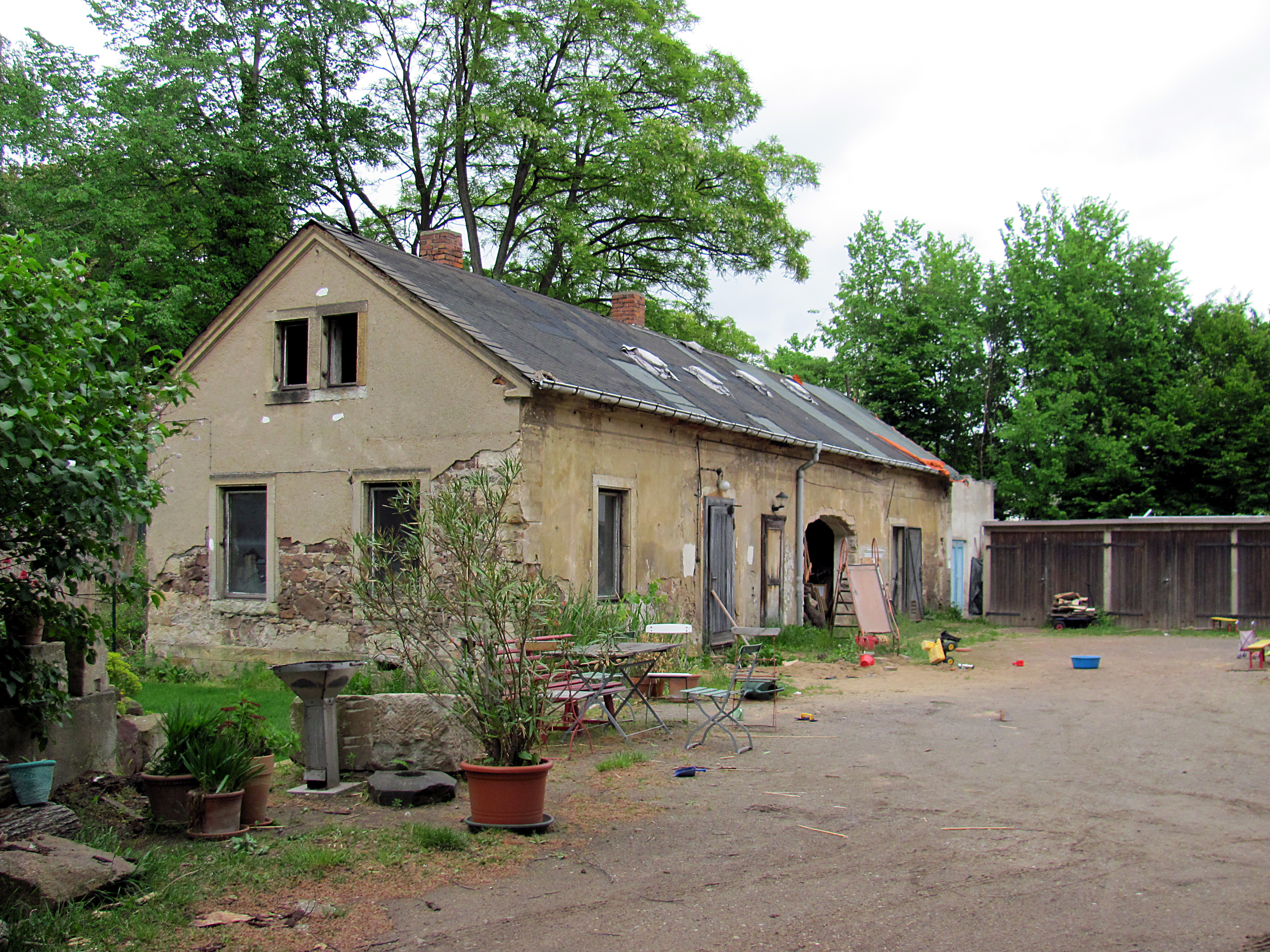 Radebeul-Niederlößnitz, Landhaus Schuchstraße 2, Nebengebäude